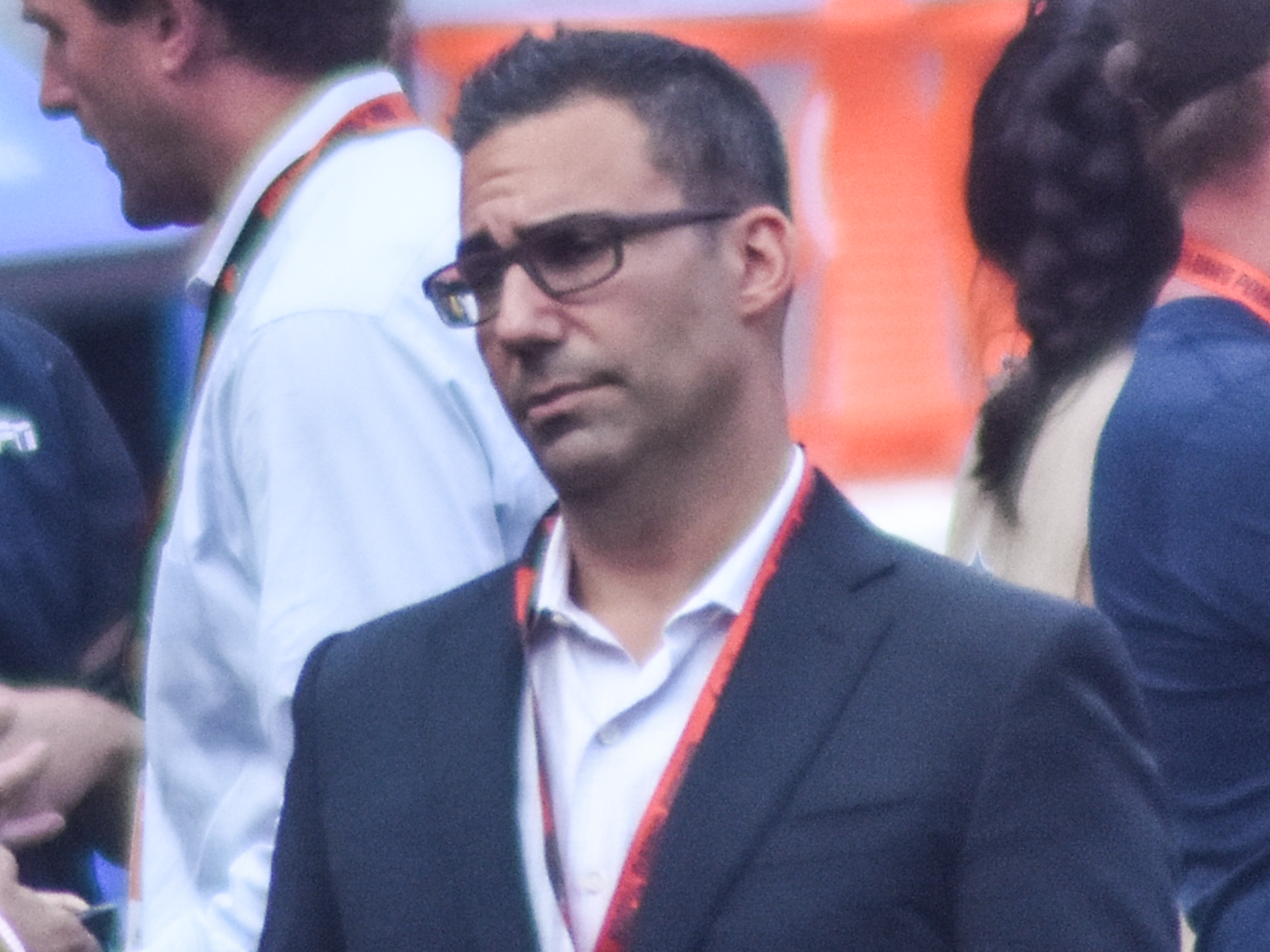 Alec Scheiner